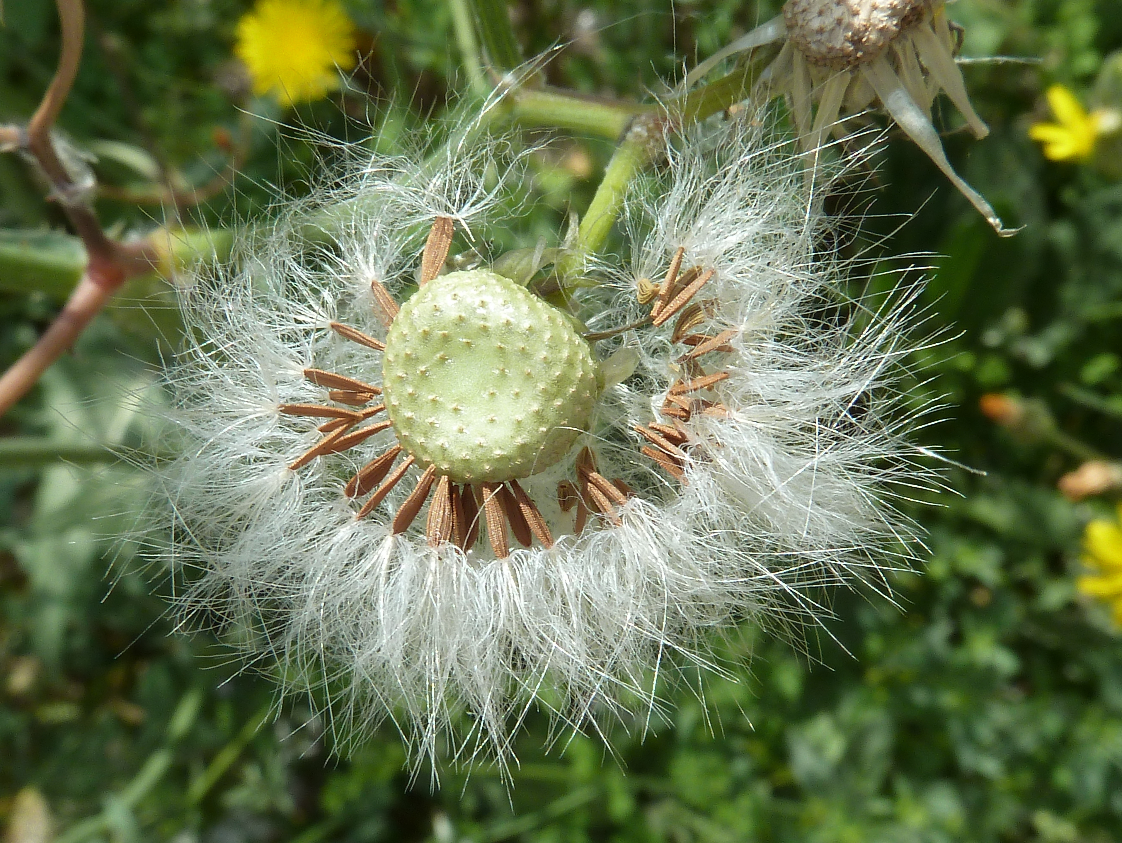 Sonchus oleraceus (cerraja) - Capítulo en fructificación con cipselas in situ. - Solar calle Compositor Manuel Berná García, Albatera, Provincia de Alicante (España).